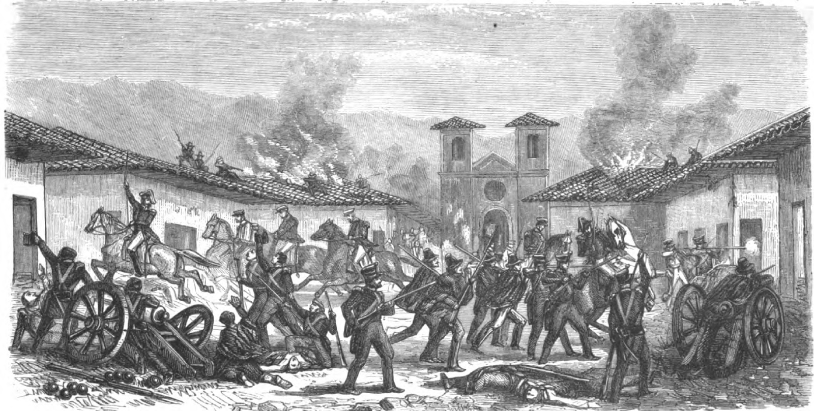 La batalla de Rancagua fue un enfrentamiento militar ocurrido el 1 y 2 de octubre de 1814 en la ciudad homónima en el contexto de la Guerra de independencia de Chile. El brigadier Bernardo O'Higgins fue sitiado en dicha villa por el coronel Mariano Osorio, resistiendo los dos días hasta que logró romper el cerco con algunos sobrevivientes y huir a Mendoza. Marcó el fin de la Patria Vieja y el inicio de la Reconquista. Imagen del libro “El ostracismo del General D. Bernardo O'Higgins” editado en 1860, cuyo copyright a expirado, pasando al dominio publico